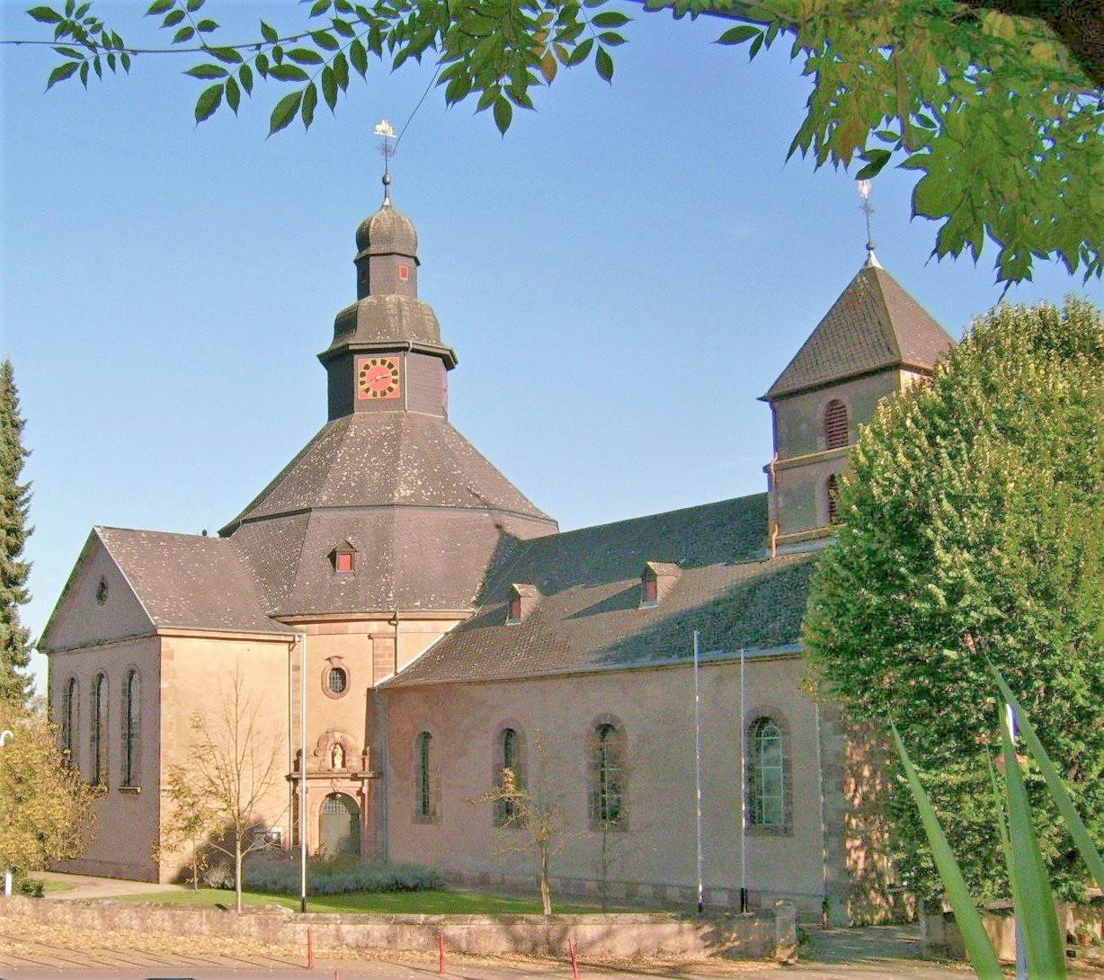 Kirche in Siersburg Church